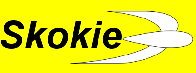 Skokie destination sign